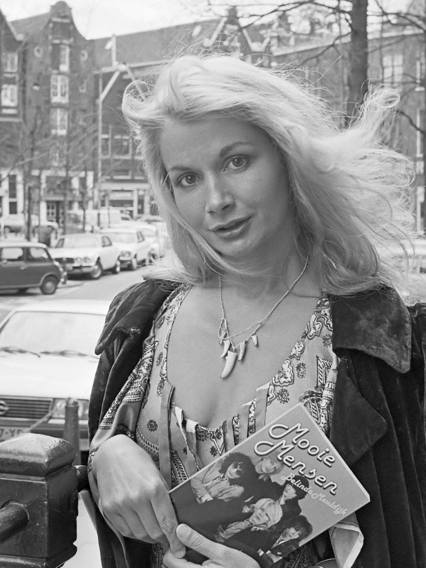 Schrijfster Belinda Meulendijk met boek "Mooie Mensen" (Amsterdam) 9 april 1980